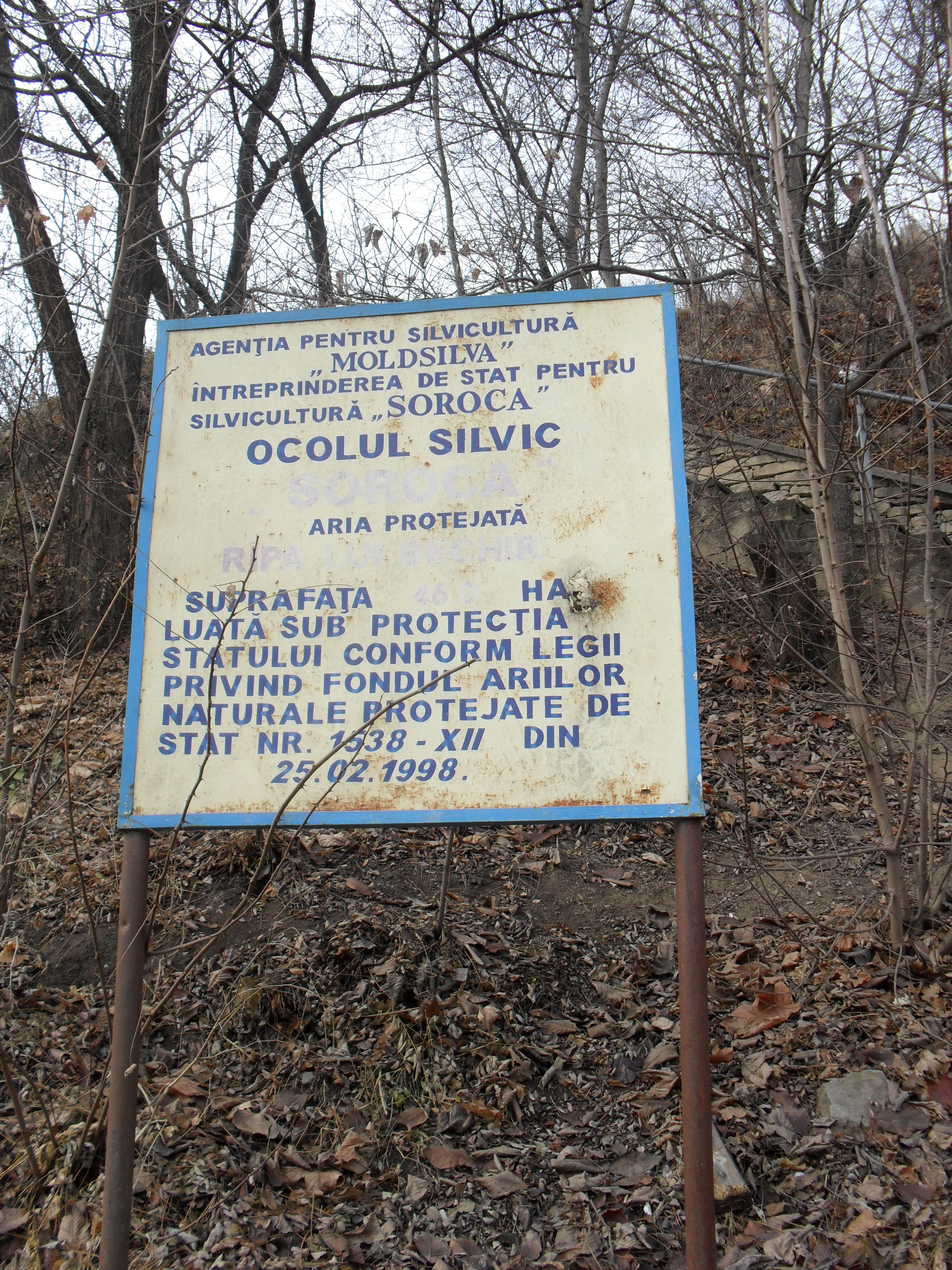 м. Сороки. Свіча Подяки.